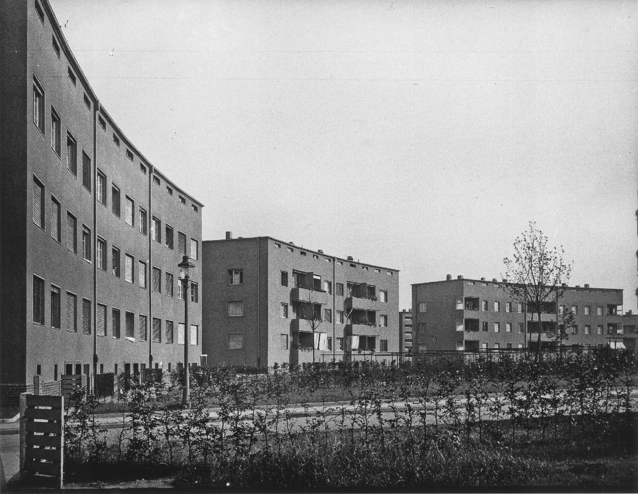 Wohnanlage Rundling Leipzig-Lößnig, errichtet 1929-1930, Architekt Hubert Ritter.